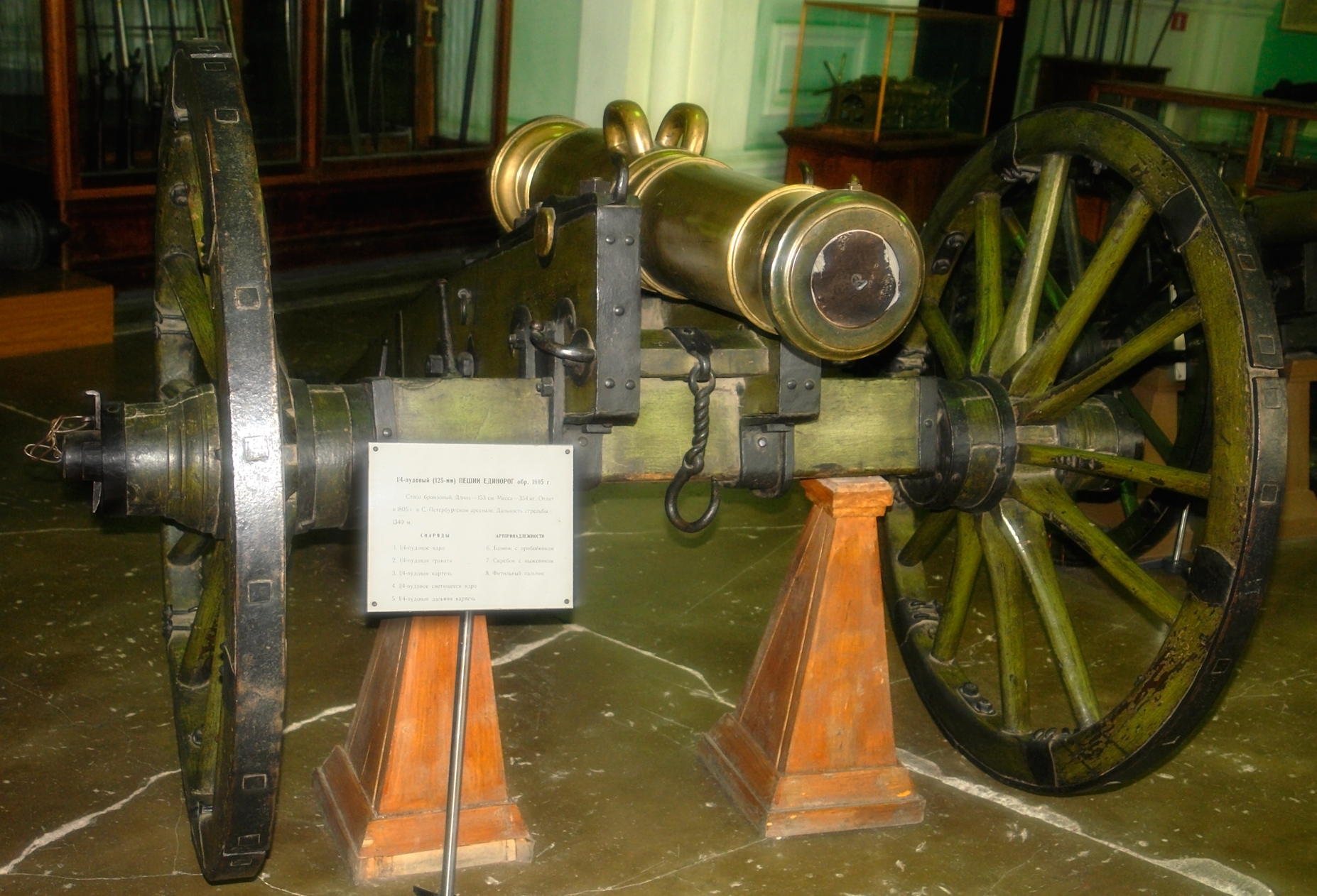 1/4-пудовый (125-мм) пеший единорог образца 1805 г. Ствол бронзовый, 153 см, 354 кг. Отлит в 1805 в Санкт-Петербургском арсенале. Дальность 1340 метров. Военно-исторический музей артиллерии, инженерных войск и войск связи, Санкт-Петербург.